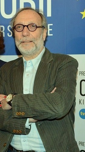 Jan Kidawa-Błoński, reżyser i scenarzysta filmowy.